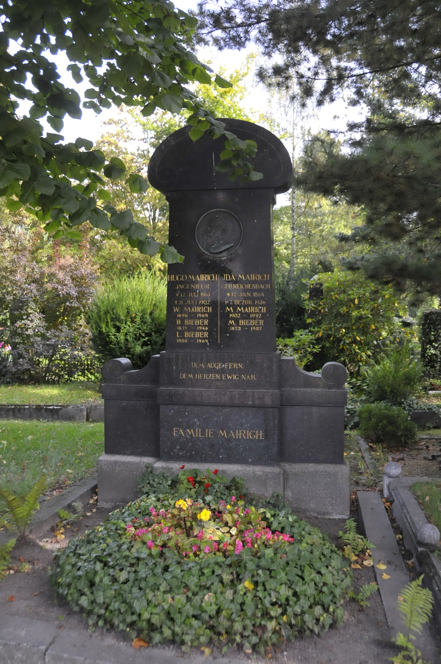 Grabstätte der Familie Mairich auf dem Hauptfriedhof Gotha